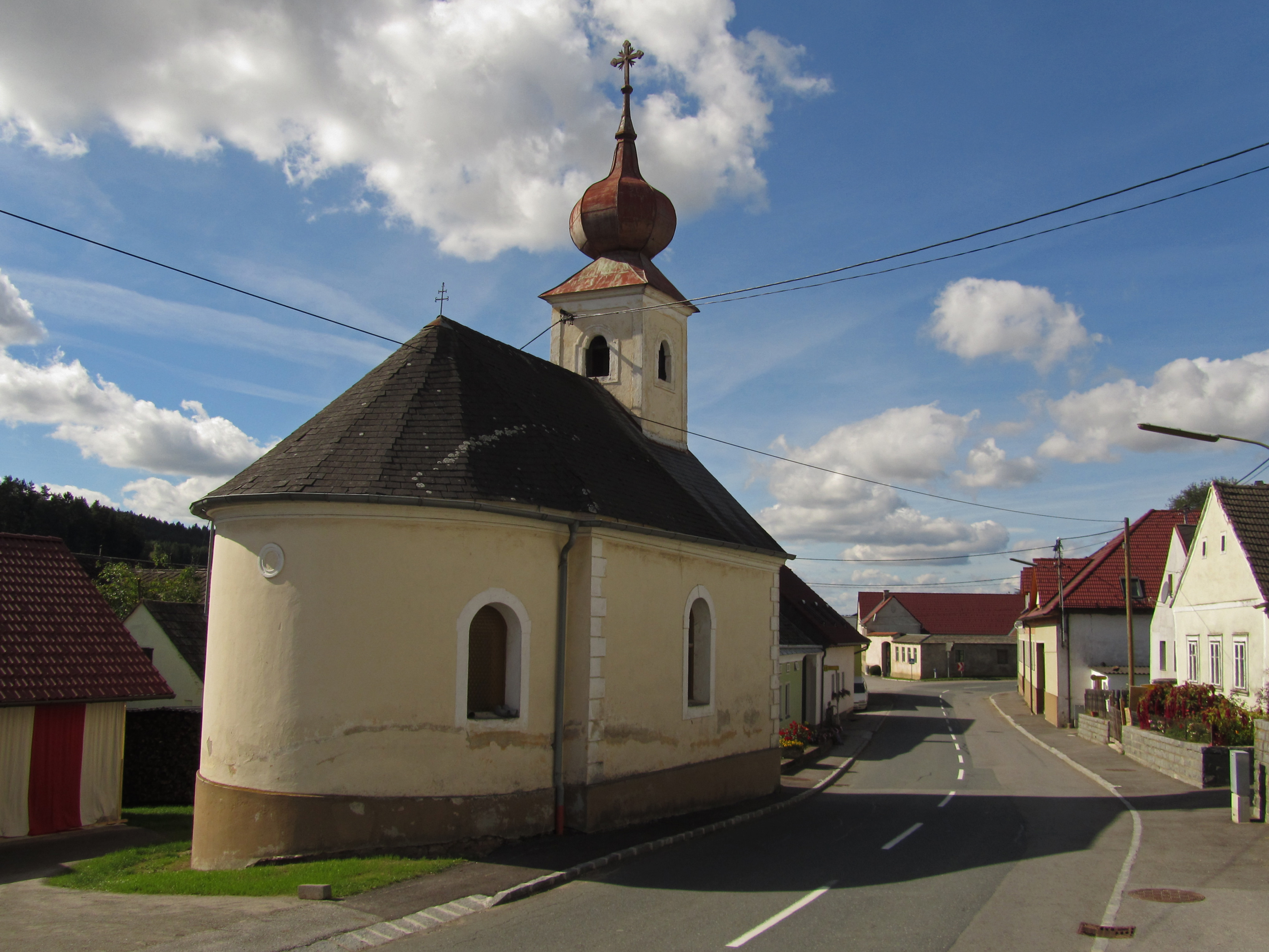 1851 erbaute, nachbarocke Kapelle mit eingezogener Halbkreisapsis und Giebelreiter mit Zwiebelhelm.